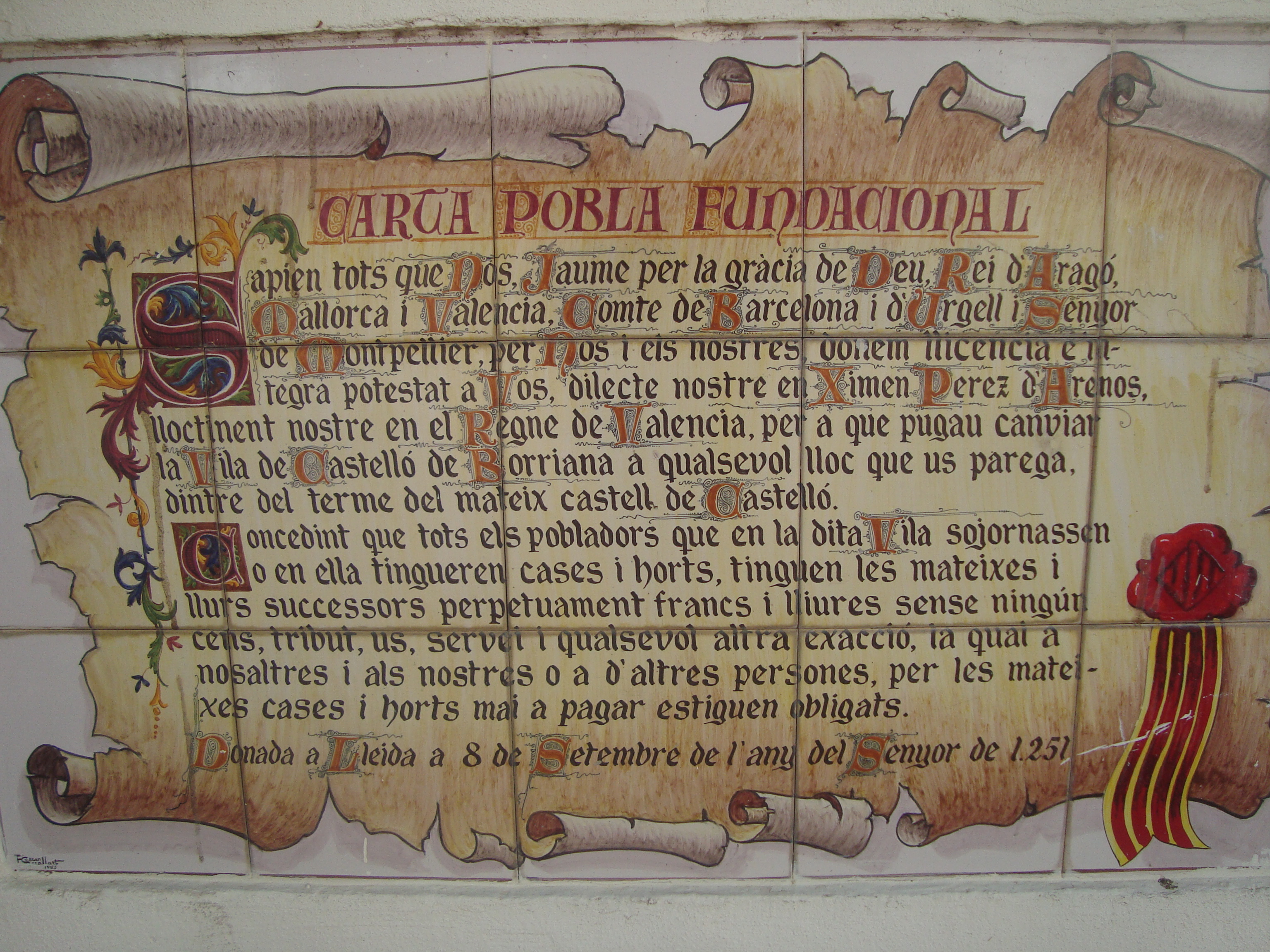 Carta pobla fundacional de Castelló de la Plana